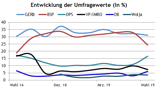 Europawahl 2019 Bulgarien Umfragen